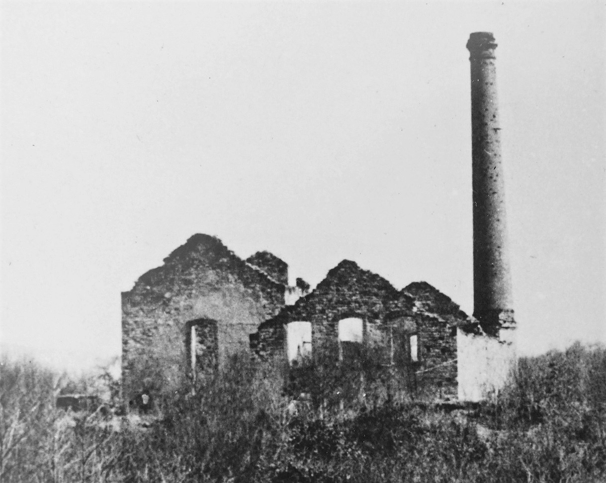 Les bâtiments du puits du Tonnet en ruine.